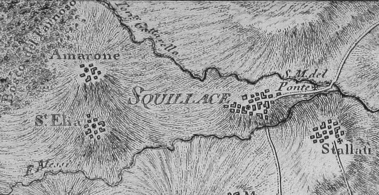 Squillace e comprensorio dopo il terremoto del 1783 nell'Atlante Geografico del Regno di Napoli. Si può notare il tragitto dei torrenti Alessi e Ghetterello.